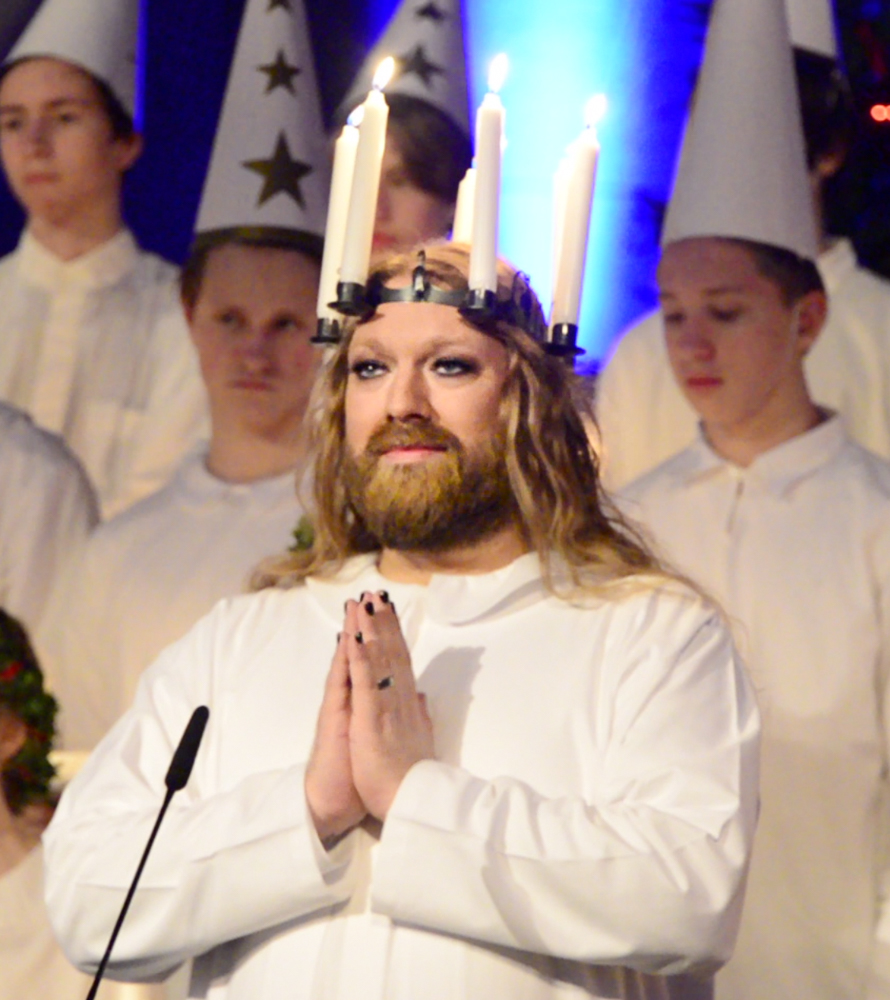 Rickard Söderberg under luciakonserten på Nordiska museet den 10 december 2017 tillsammans med Adolf Fredriks musikklasser.